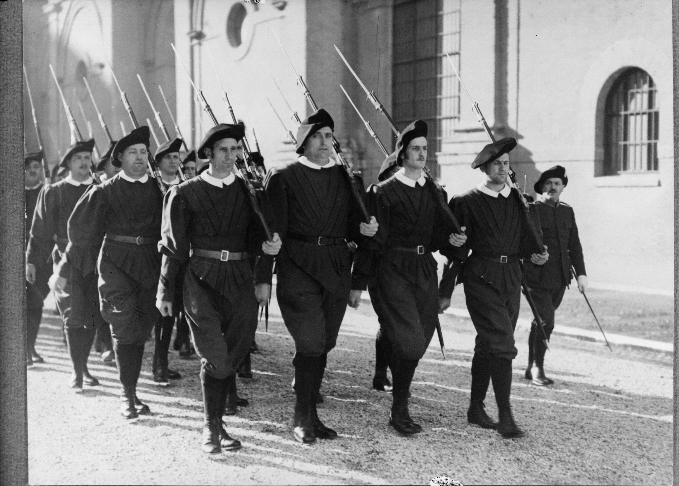 Collectie / Archief : Fotocollectie Van de Poll Reportage / Serie : Rome: De Pauselijke Zwitserse Garde in Vaticaanstad Beschrijving : Peloton marcheert in exercitie-tenue met geweer Datum : 1938 Locatie : Italië, Rome, Vaticaanstad Trefwoorden : militaire oefeningen, militairen, uniformen, wapens Fotograaf : Poll, Willem van de, [onbekend] Auteursrechthebbende : Nationaal Archief Materiaalsoort : Glasnegatief Nummer archiefinventaris : bekijk toegang 2.24.14.02 Bestanddeelnummer : 190-0984